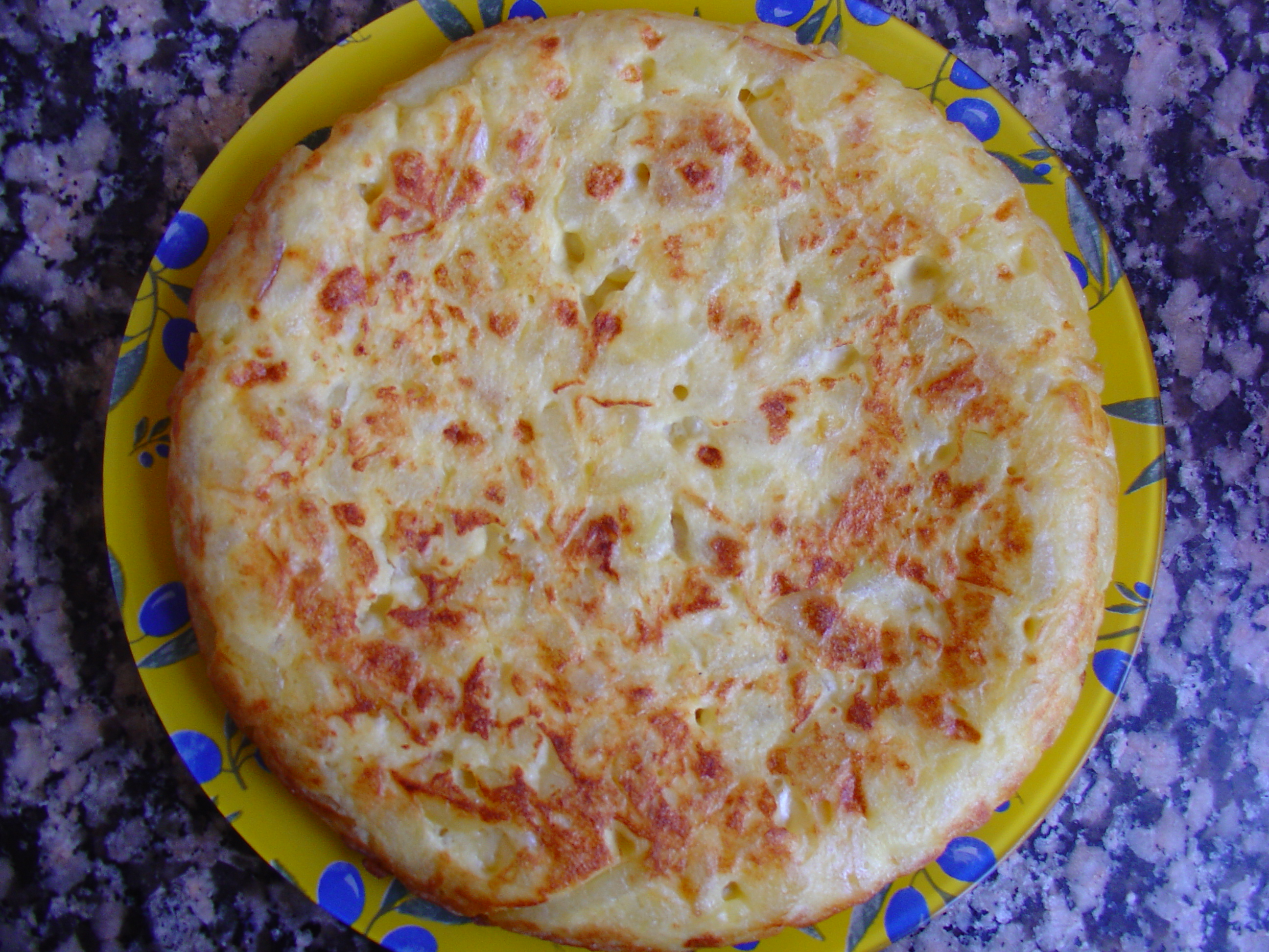 Tortilla de patatas, tortilla española